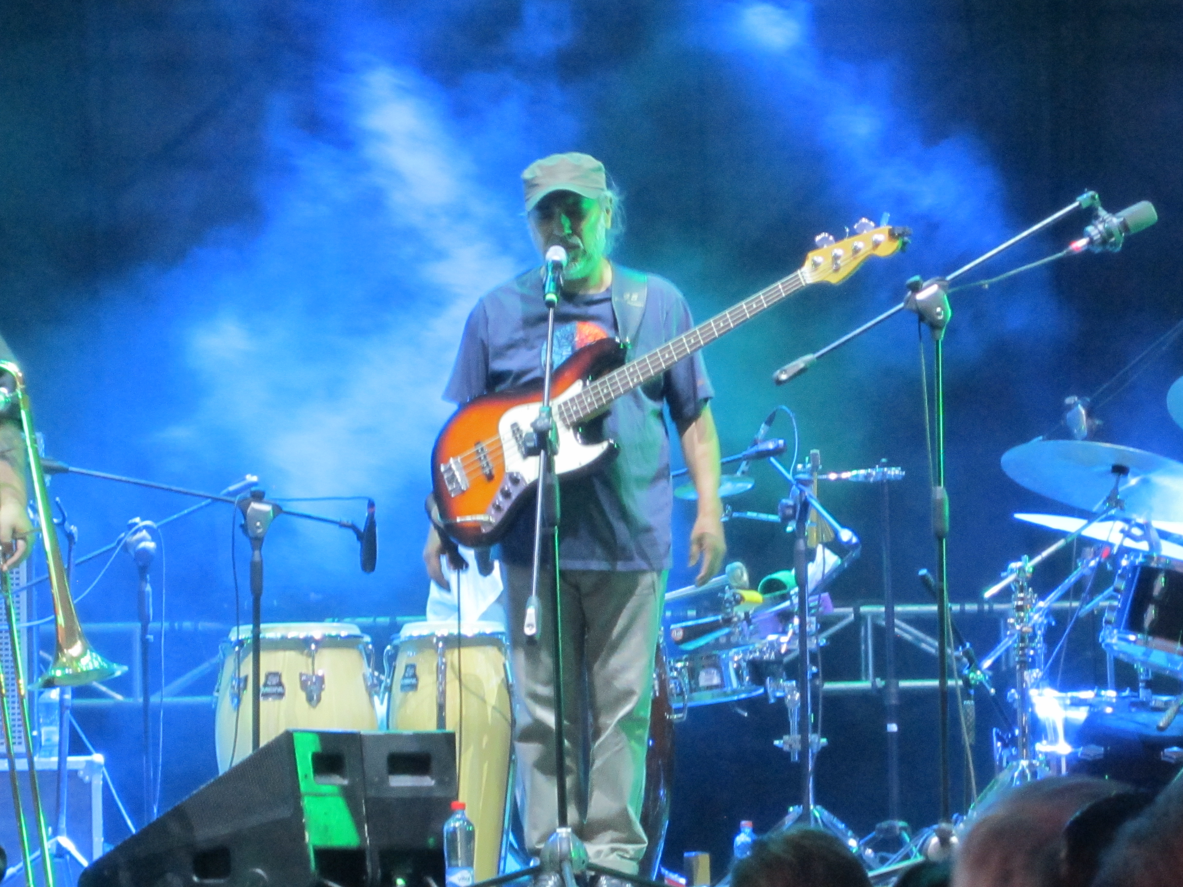 Pablo Lecaros en el Festival Providencia Jazz 2017